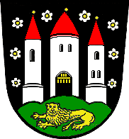 Wappen von Dahlenburg und der Samtgemeinde Dahlenburg